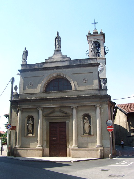 Pognano - Chiesa dell'Immacolata